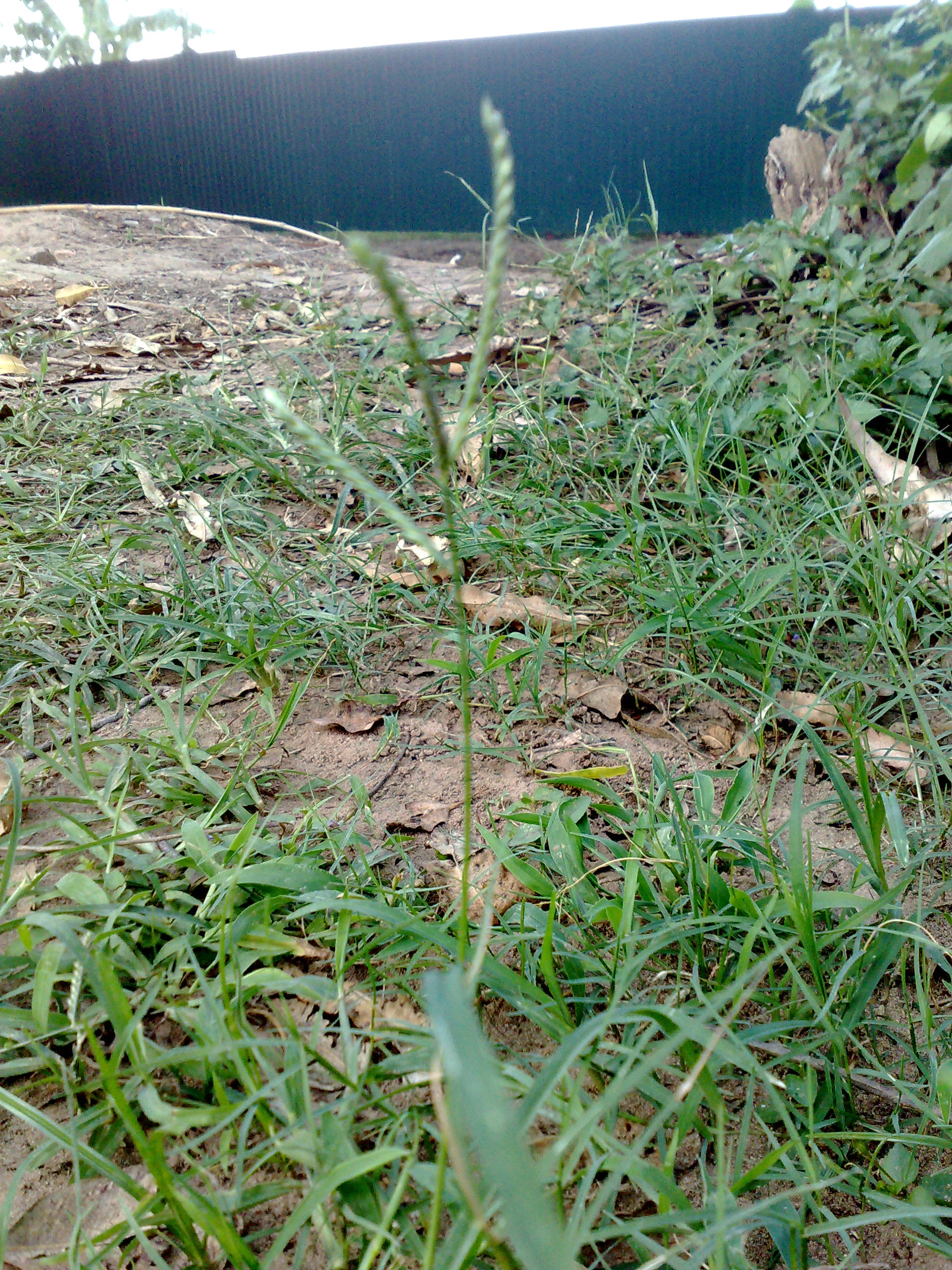 Hình chụp cụm hoa cây cỏ gà. Tôi tự chụp và tải lên để minh họa cho bài viết Cỏ gà.